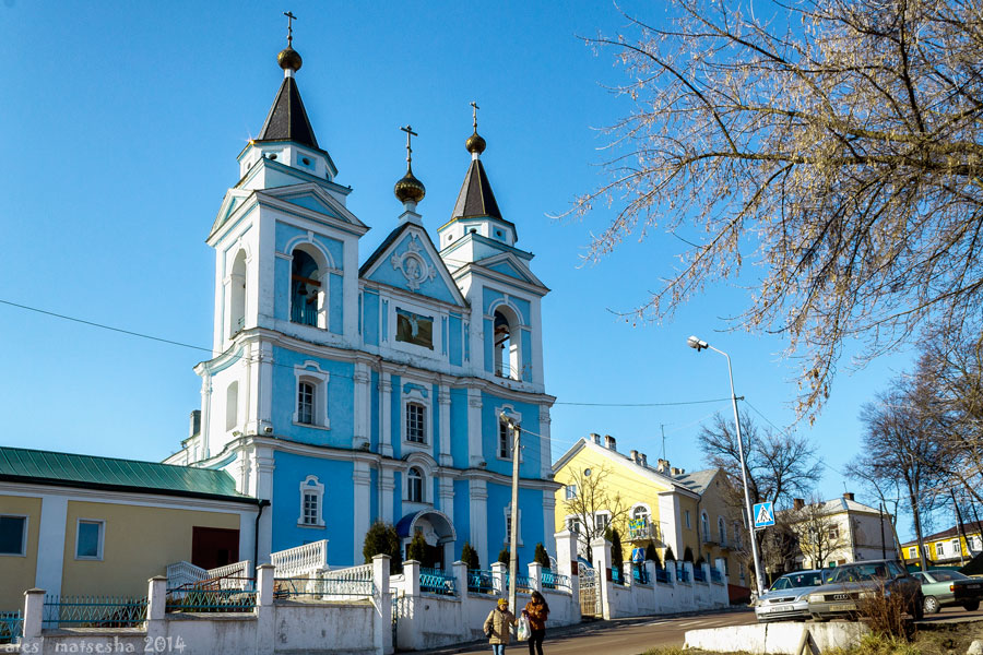 Мазыр. Міхайлаўскі сабор